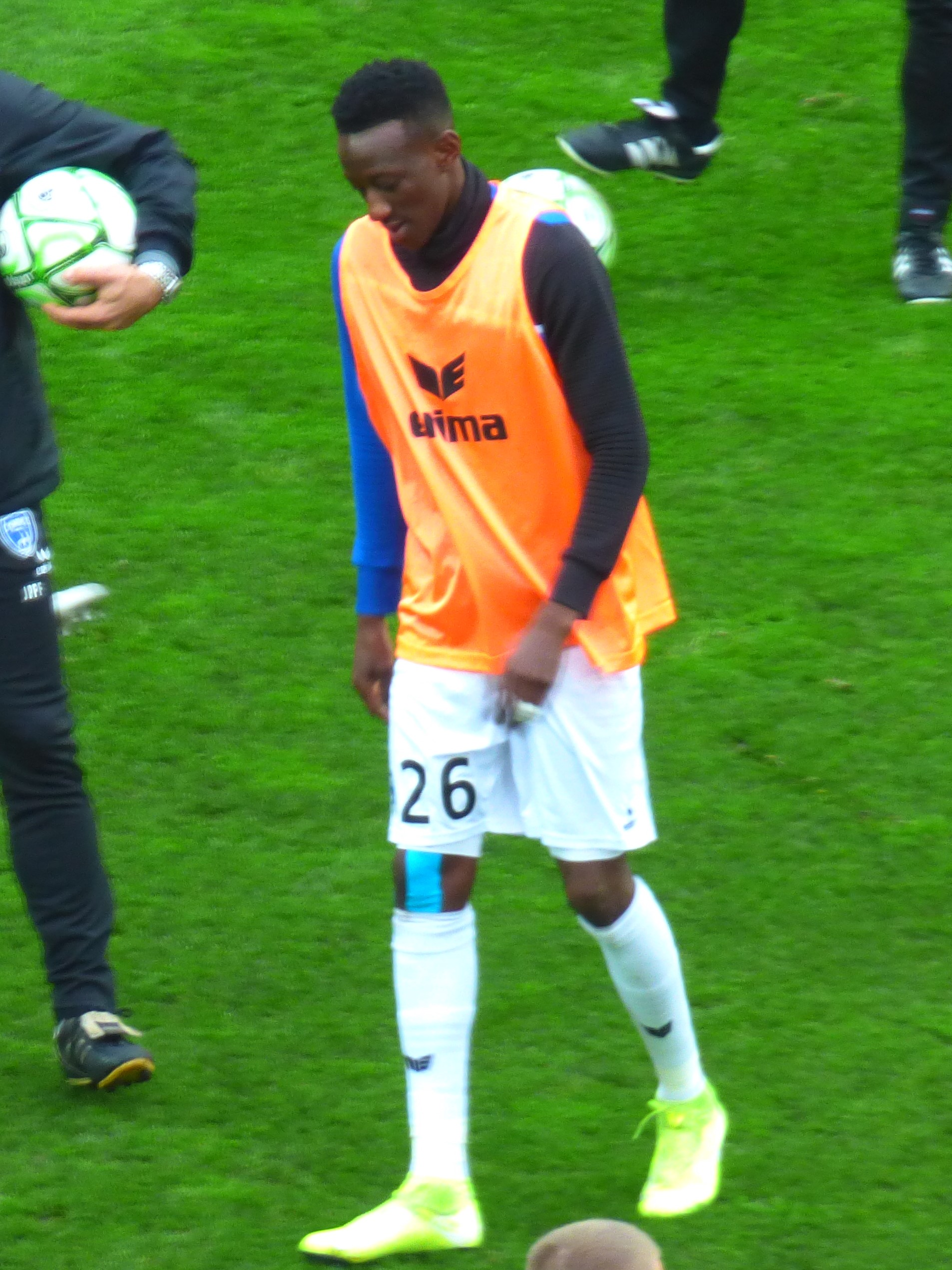 Brahim Konaté avant le match Lens / Niort, le 21 décembre 2019, comptant pour la dix-neuvième journée du championnat de France de football de Ligue 2 2019-2020.